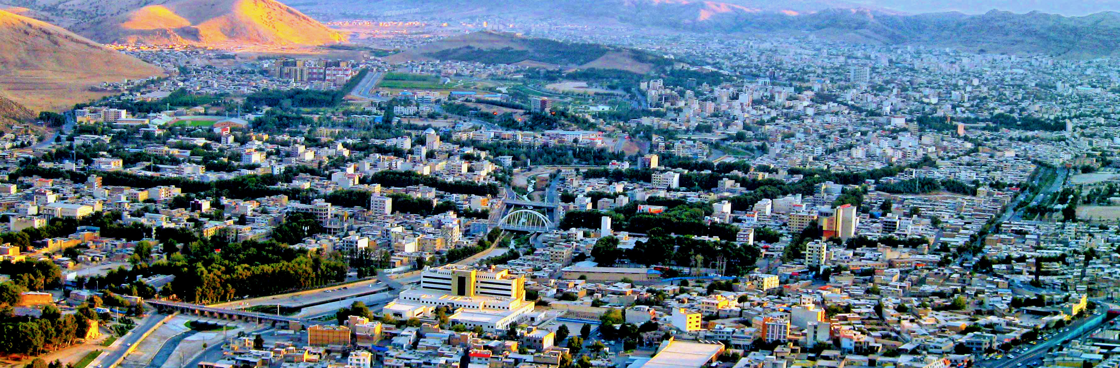 سراسر نمای خرم آباد